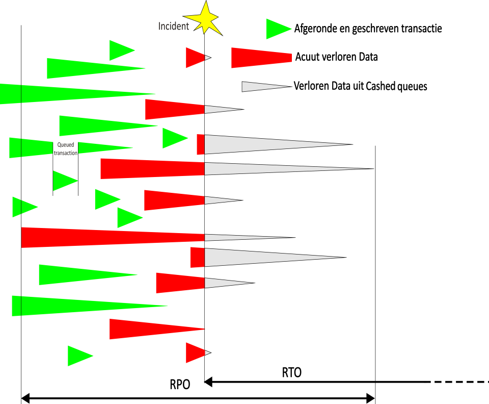 schematische weergave van de begrippen RPO en RTO